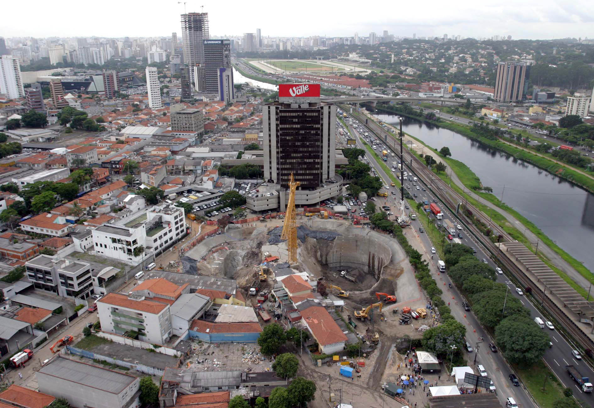 Vista do acidente ocorrido nas obras da estação Pinheiros da Linha 4-Amarela do Metrô de São Paulo em 12 de janeiro de 2007. Saldo de 7 mortos.